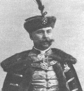 Losonczi báró Bánffy Dezső (1843 – 1911) magyar politikus, főispán, a képviselőház elnöke, miniszterelnök.